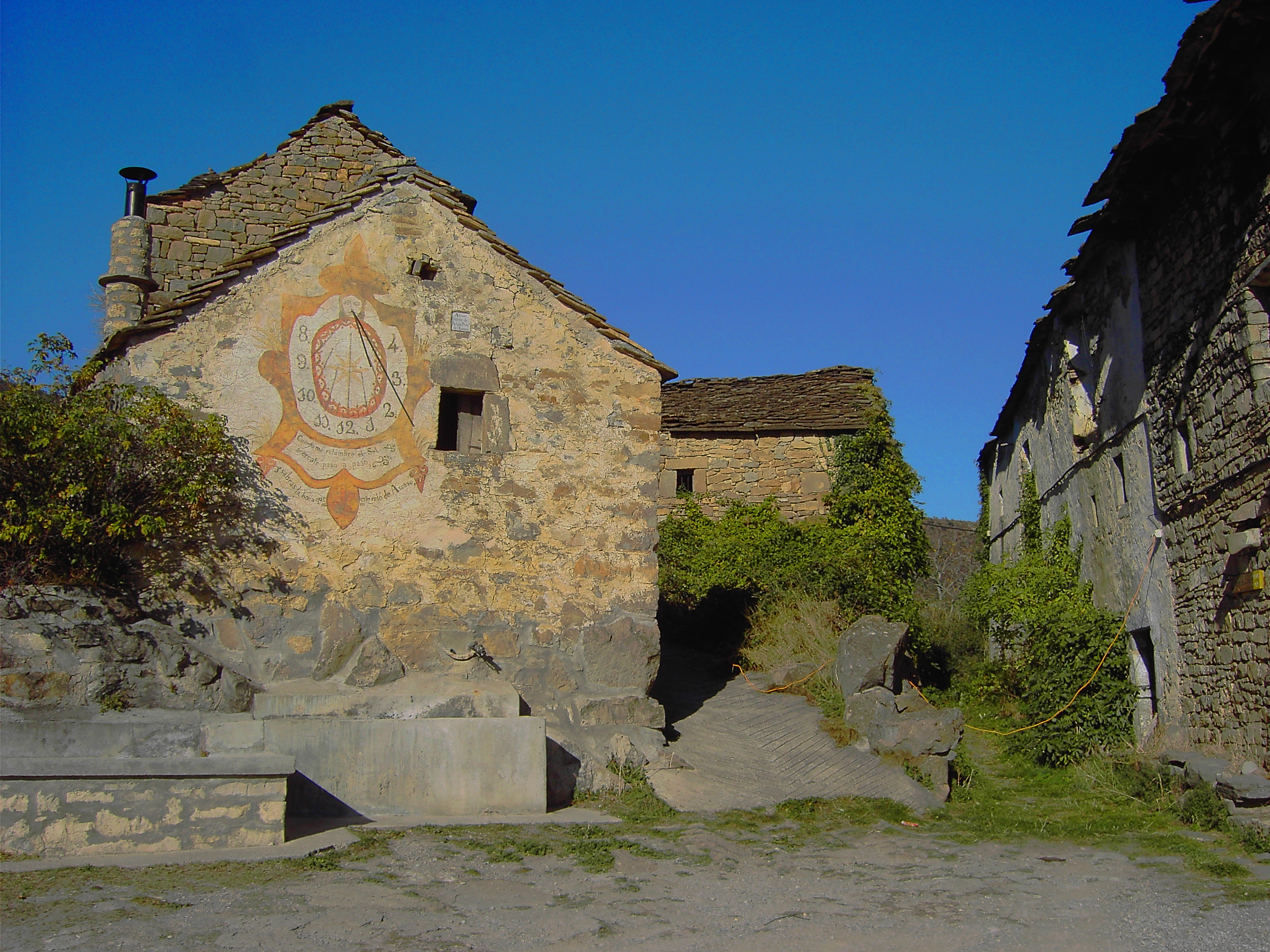 La plaza de Ascaso, con su famoso reloj de sol.